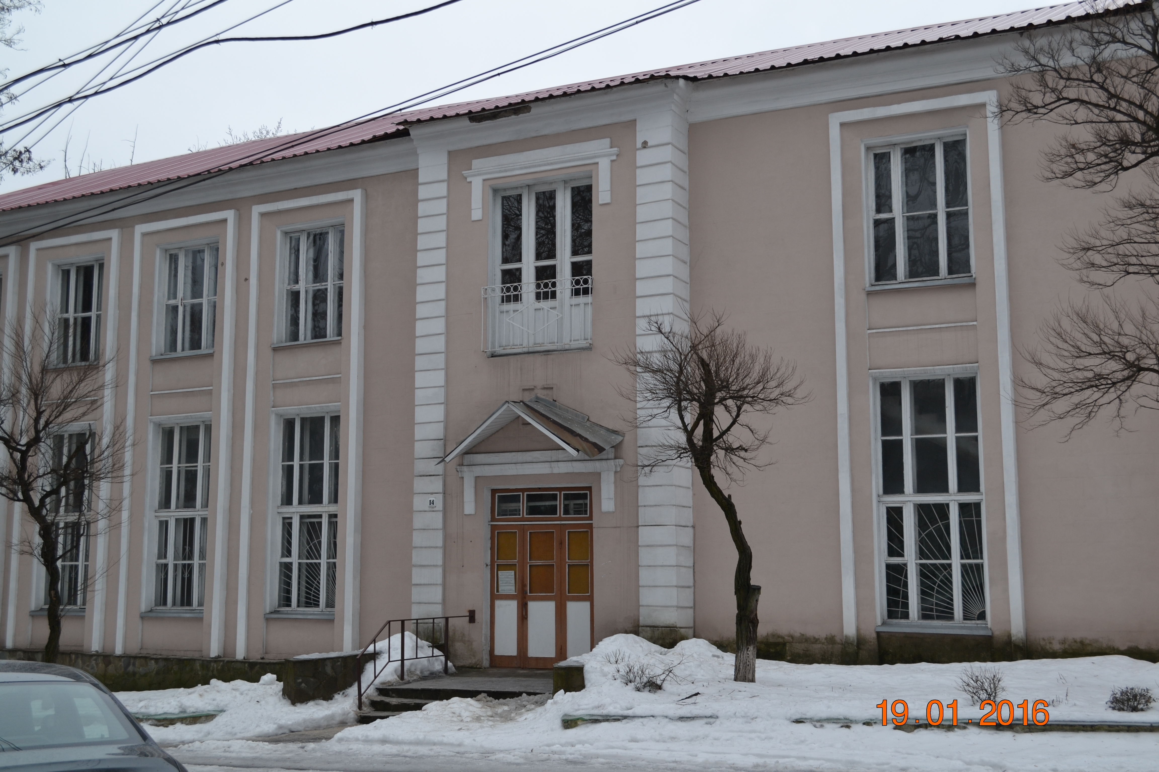 Здание отдела физико-химических исследований